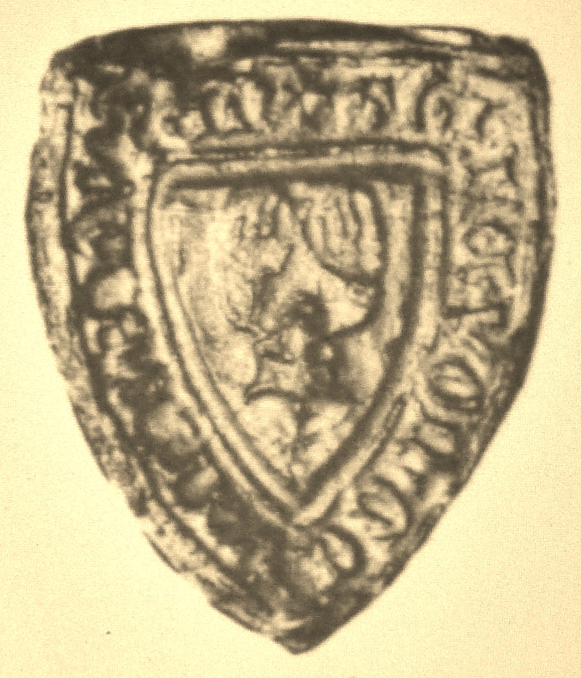 Siegel des Thilo von Gieboldehausen (1392) (TILE VON GEVELDEHVSEN) in Otto Posse: Die Siegel des Adels der Wettiner Lande. Band III, Verlag Wilhelm Baensch Dresden 1908